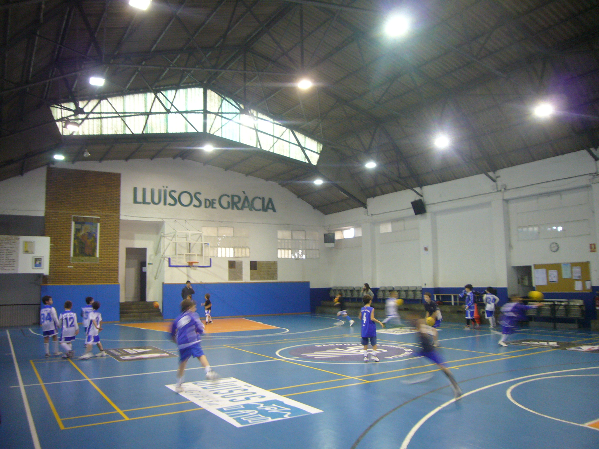 Pista de basquet dels Lluïsos de Gràcia